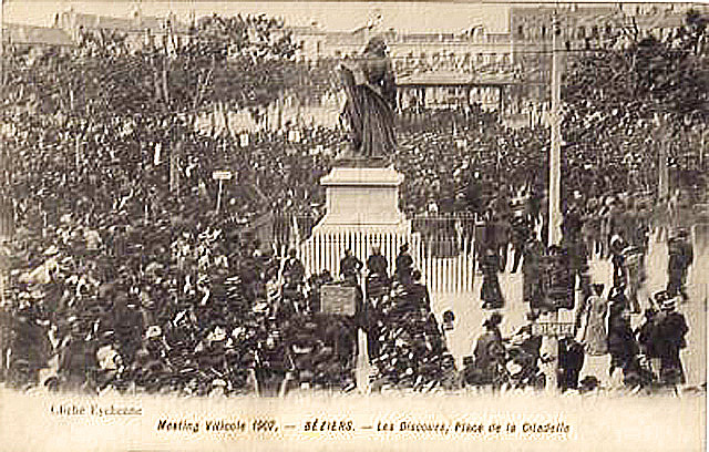 Les discours sur la place de la Citadelle à Beziers